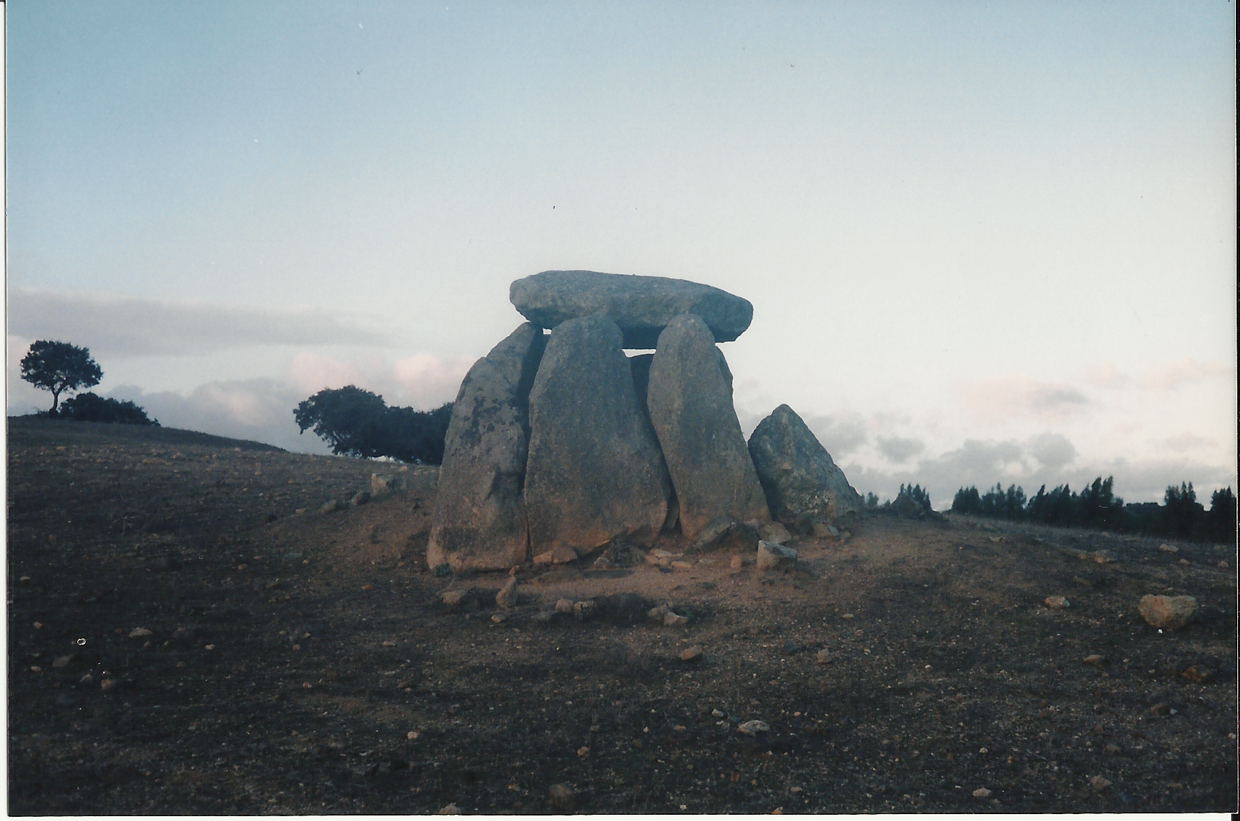 Anta 2. Barrocal. Tourega. Évora. Portugal.